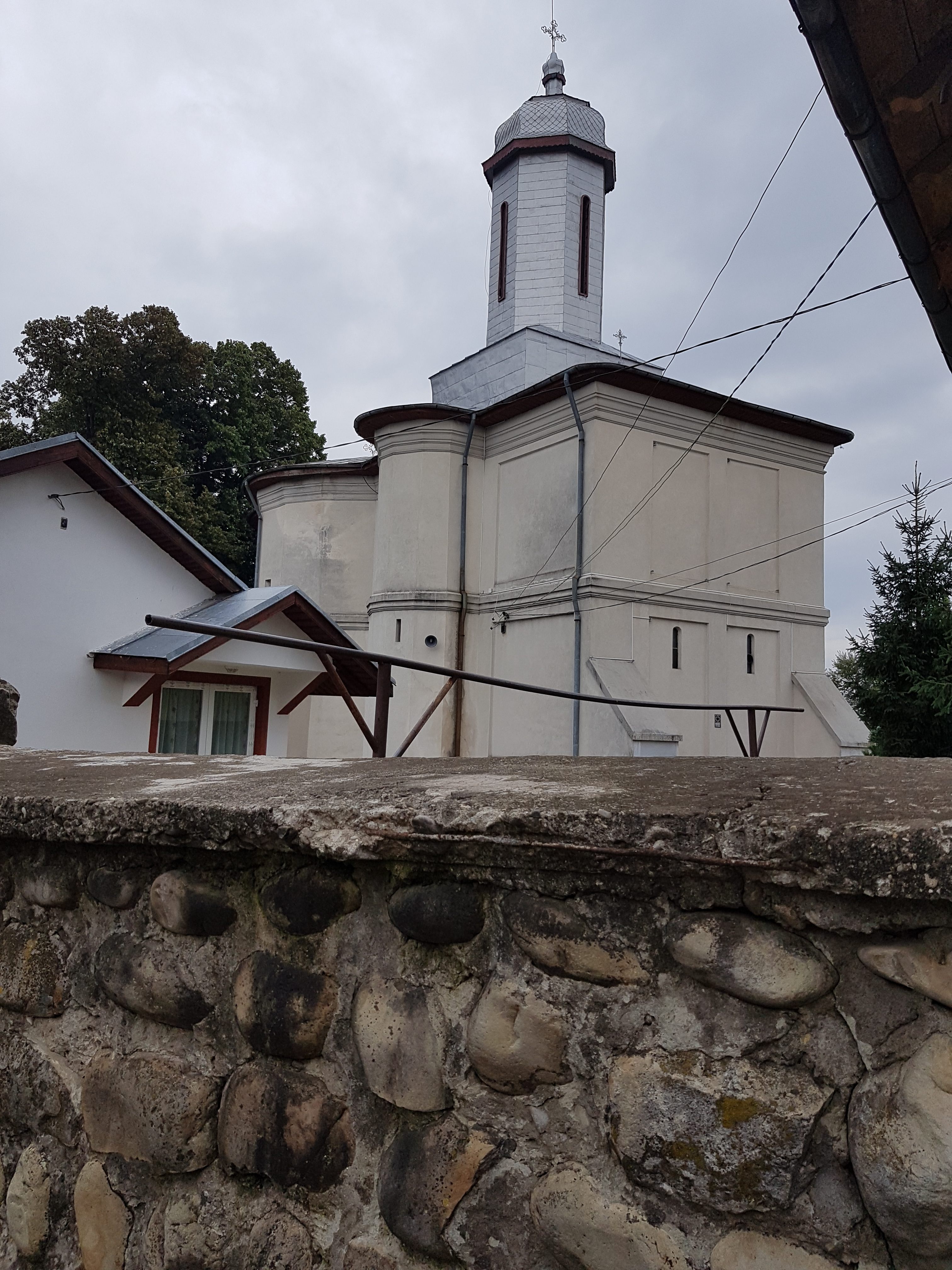 Biserica „Nașterea Maicii Domnului”